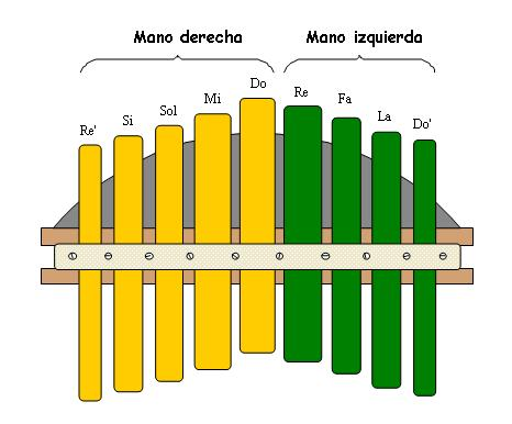 Diagrama tomado de REBOLLEDO KLOQUES, Octavio, El marimbol. Orígenes y presencia en México y el mundo, p. 229.